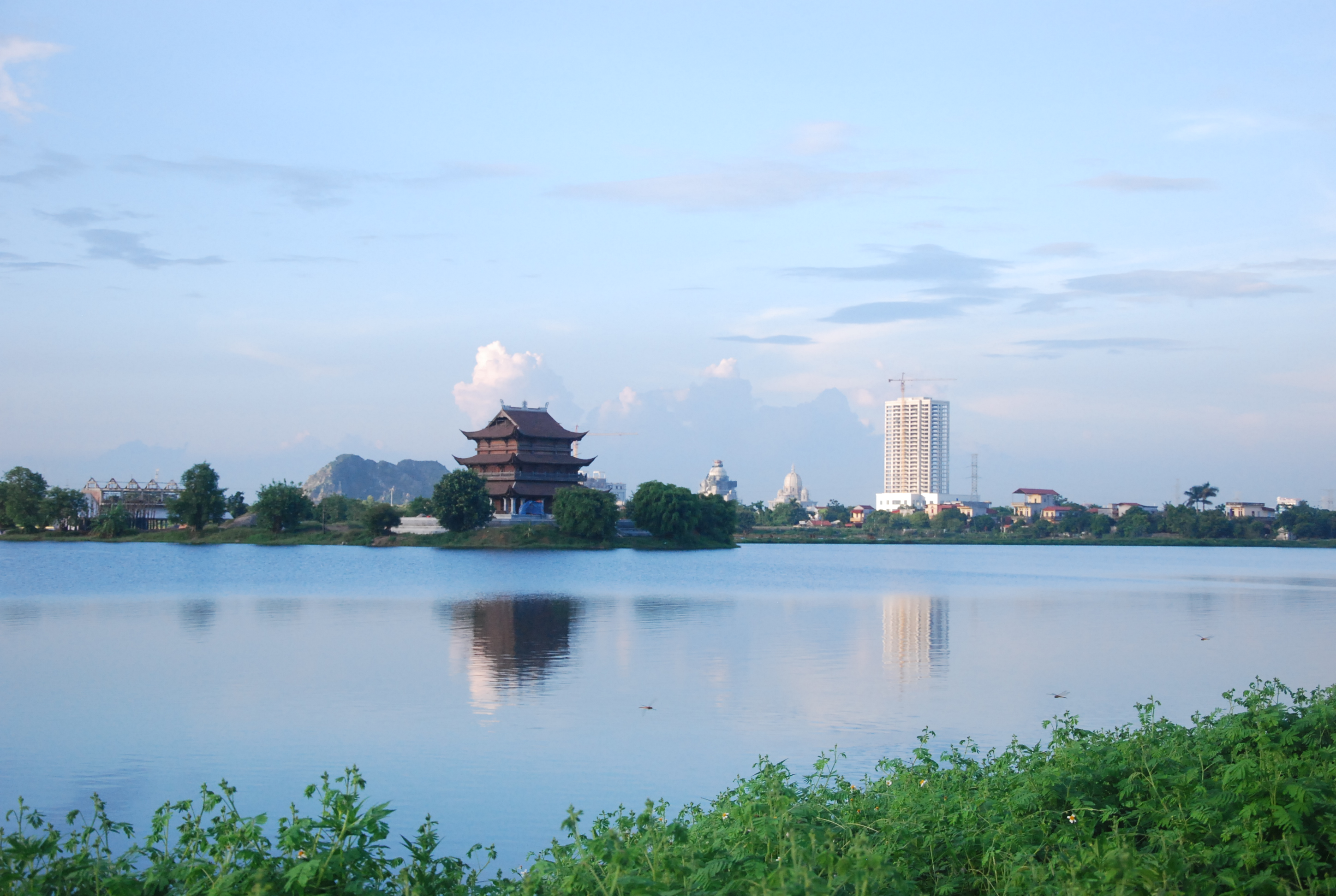 Phong cảnh hồ núi Chàng Lớ trong Công viên văn hóa Tràng An ở thành phố Ninh Bình